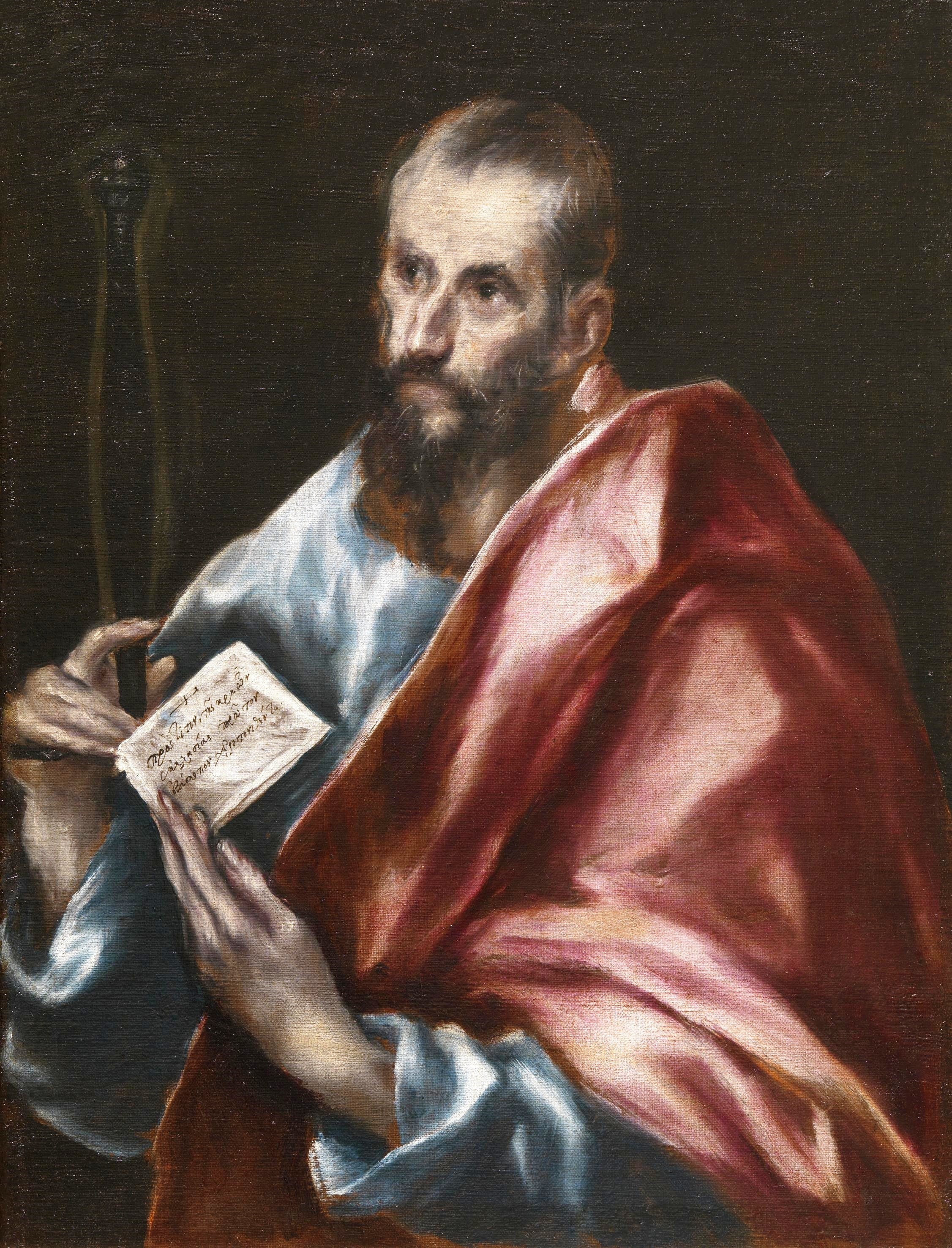 La obra representa al apóstol San Pablo, llamado el Apóstol de los Gentiles.